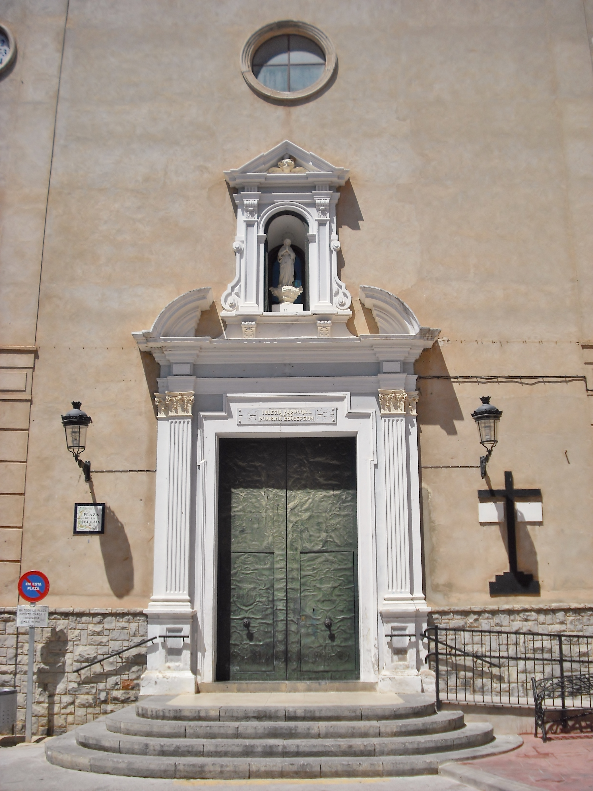 Navaixes. 07.081-001.